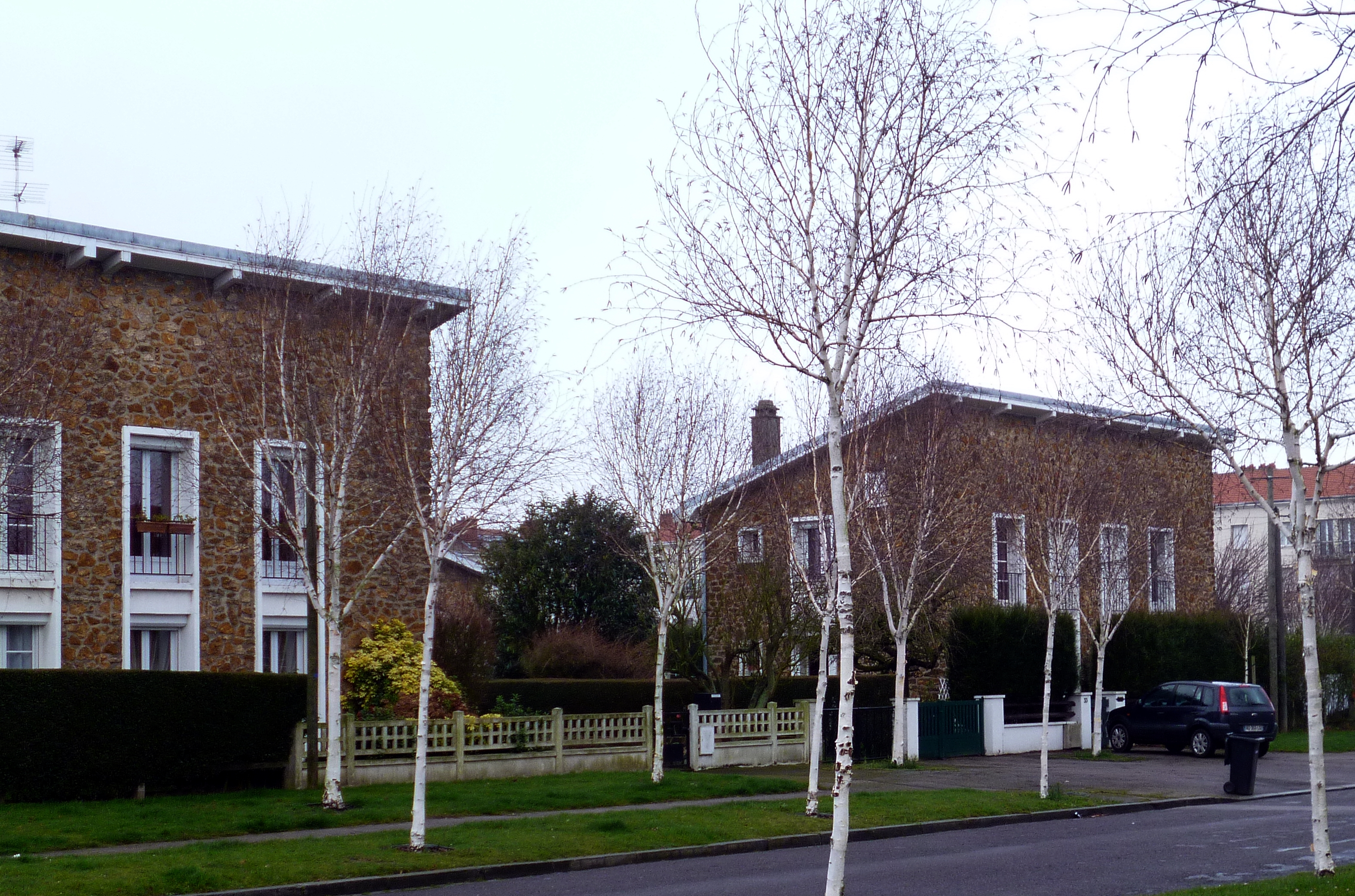 Maison meulière Aplemont Le Havre